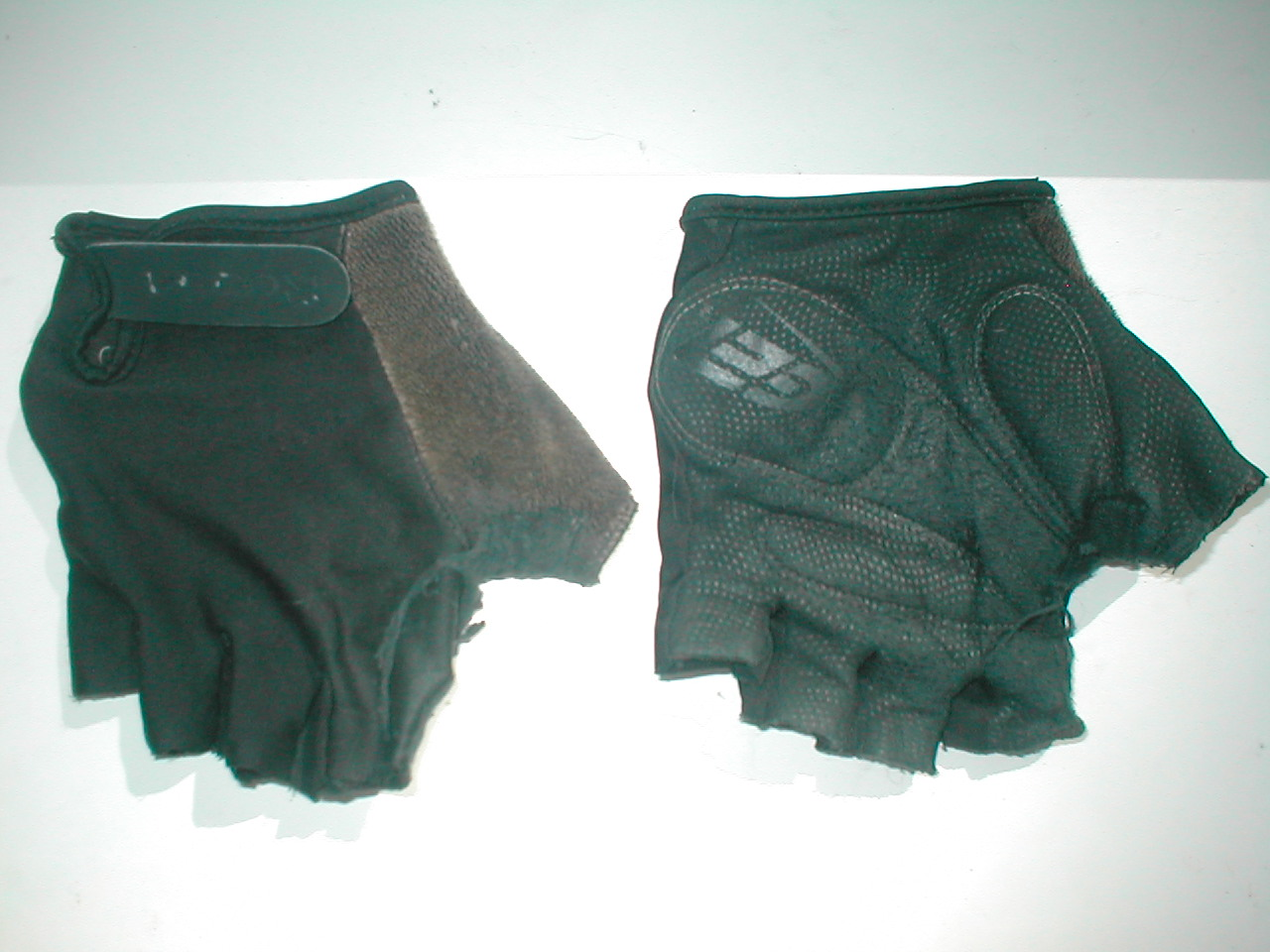 Rennradhandschuhe in Farbe schwarz mit "abgeschnittenen Fingern"